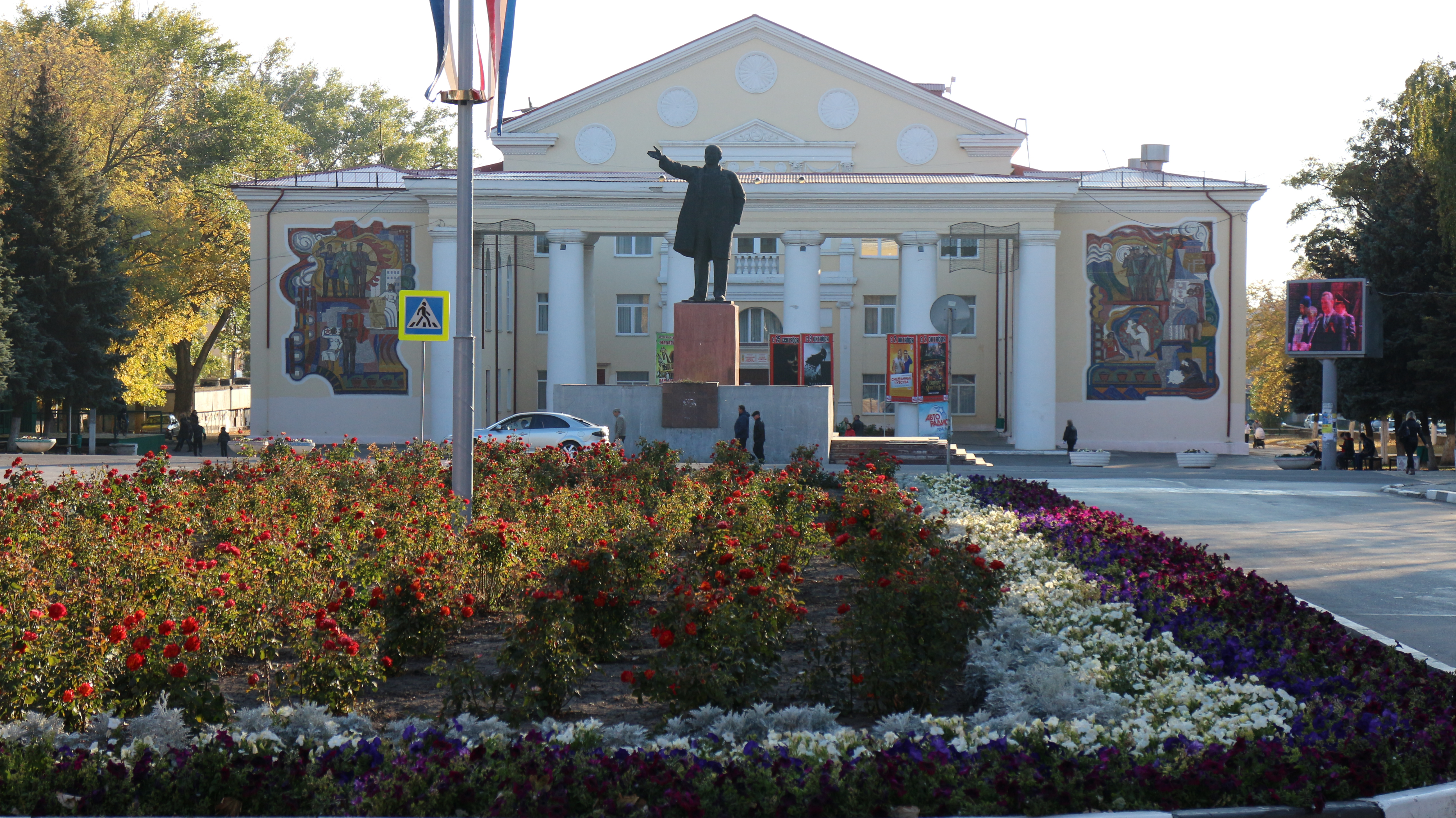 улица Мира Гуково, Ростовская область, Россия